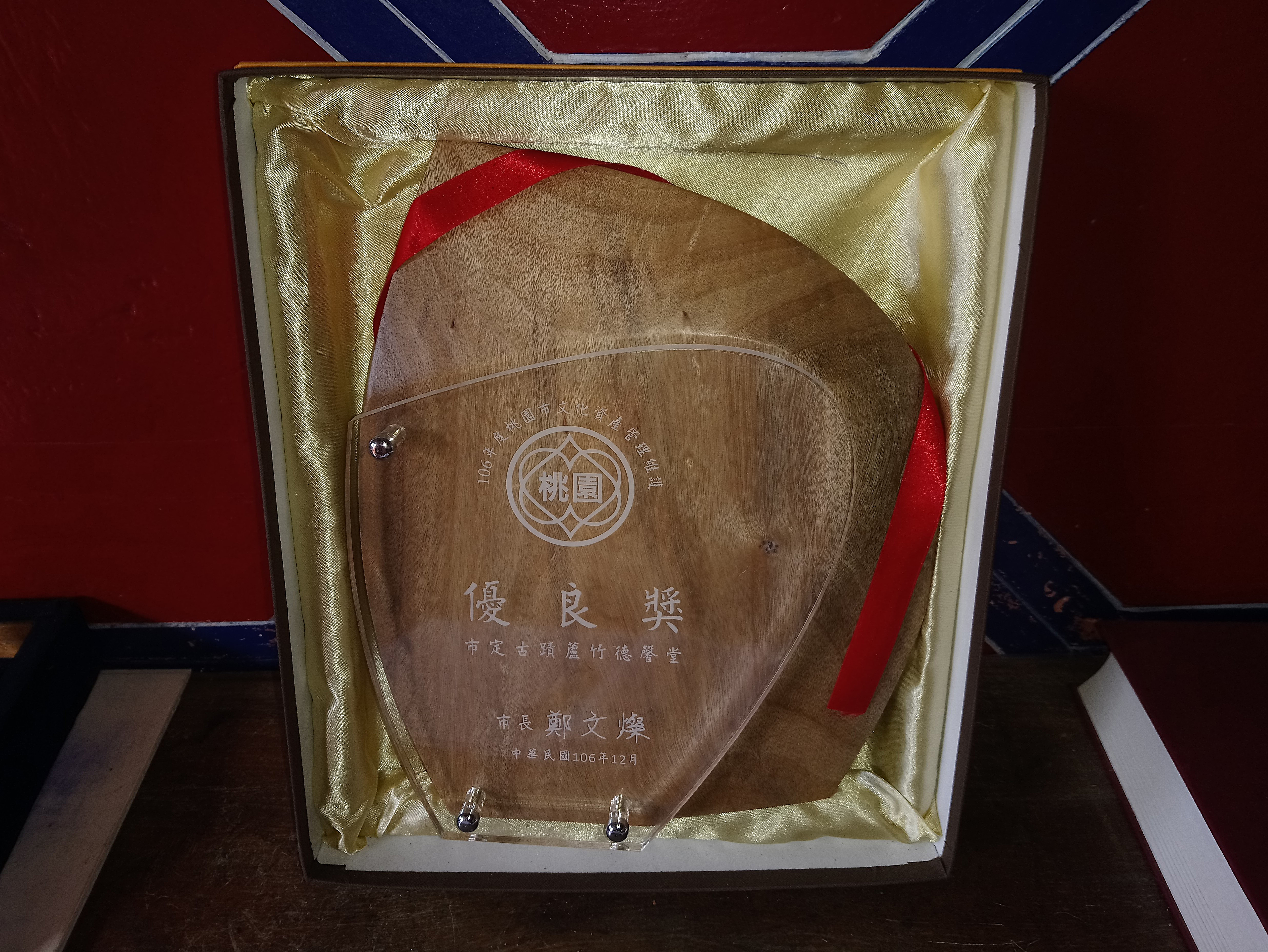 桃園市市長鄭文燦頒予蘆竹德馨堂的桃園市文化資產管理維護優良獎,桃園市蘆竹區南崁地區山鼻里